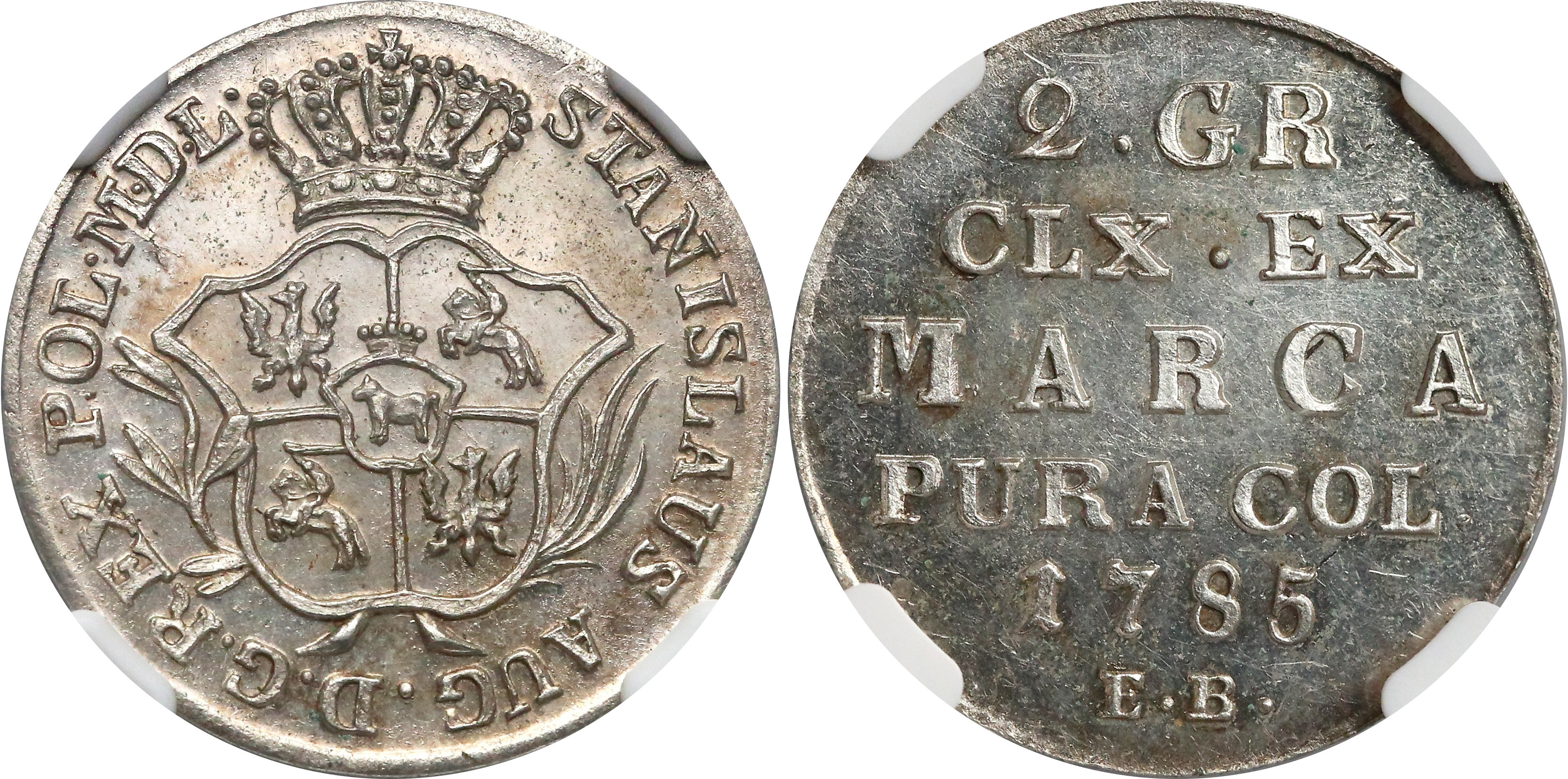 Półzłotek koronny 1785